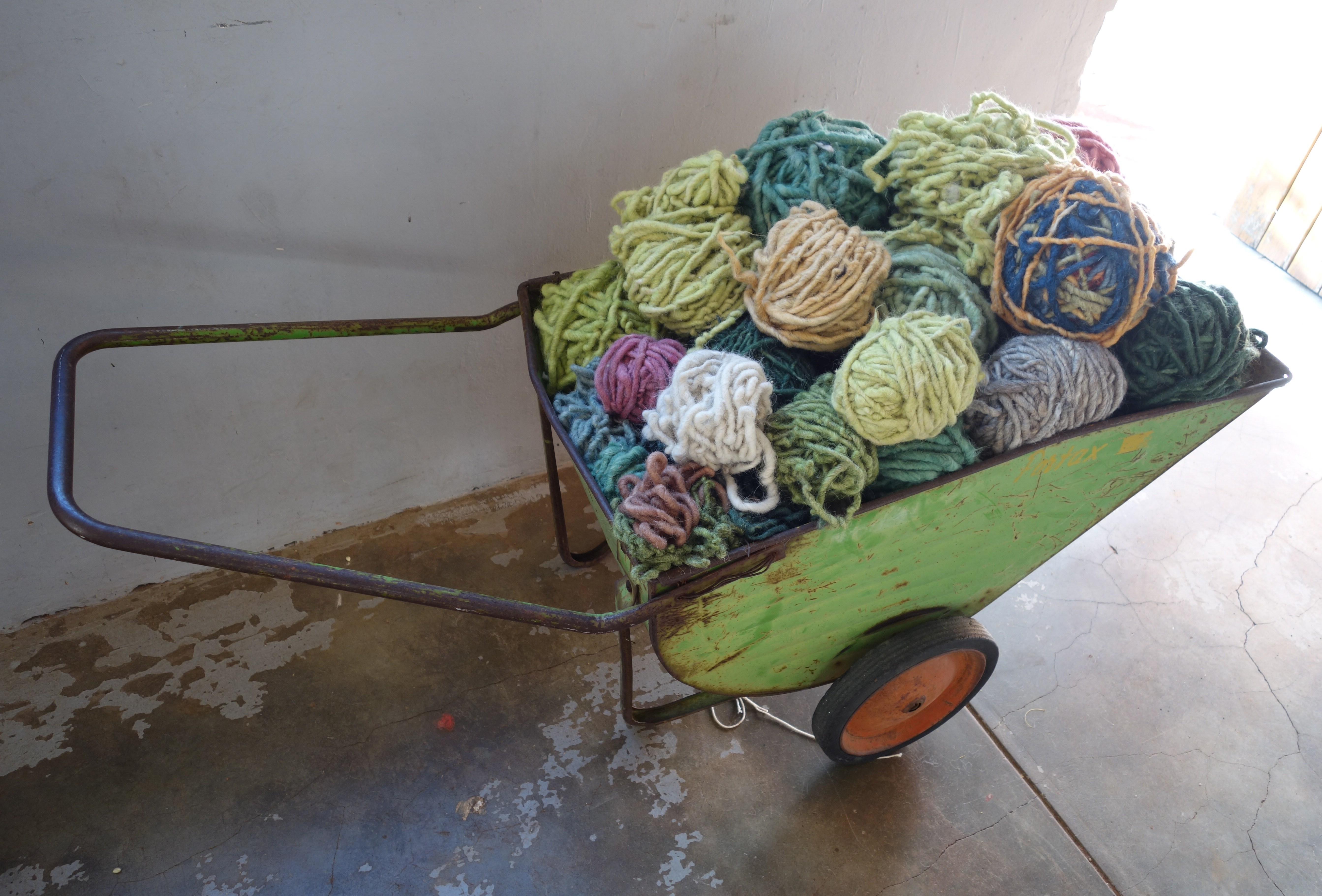 Namibia, Farm Beenbreck, Wollweberei „Gün Güs“. Knäuel aus Swakarawolle.